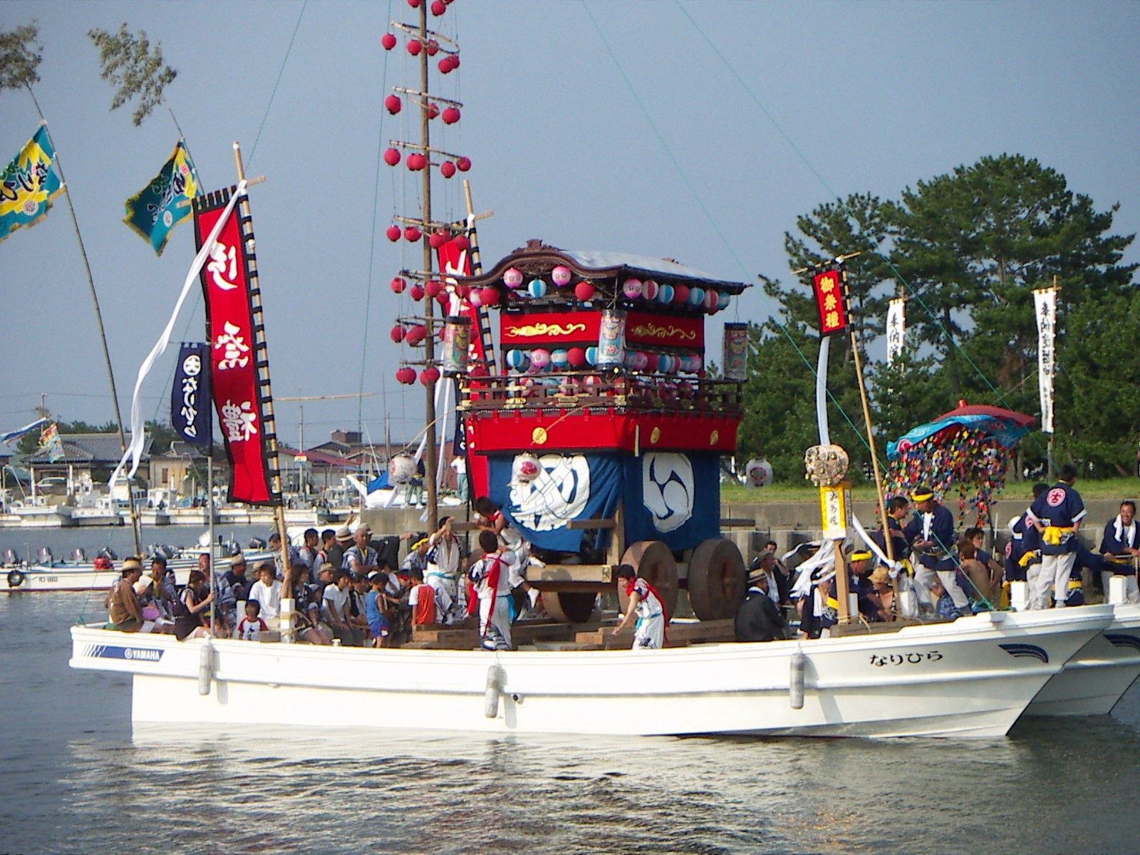 大淀祇園祭 三世古地区山車 海上渡御